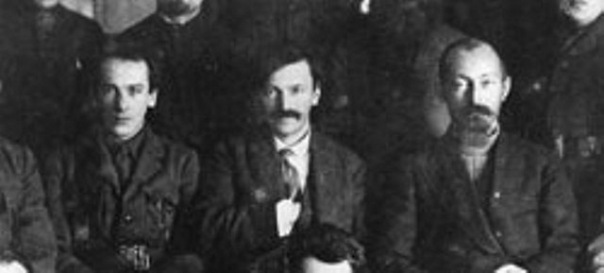 Genrich G. Yagoda, Wjatscheslaw Menschinski und Felix Dserschinski. 1920er Jahre.